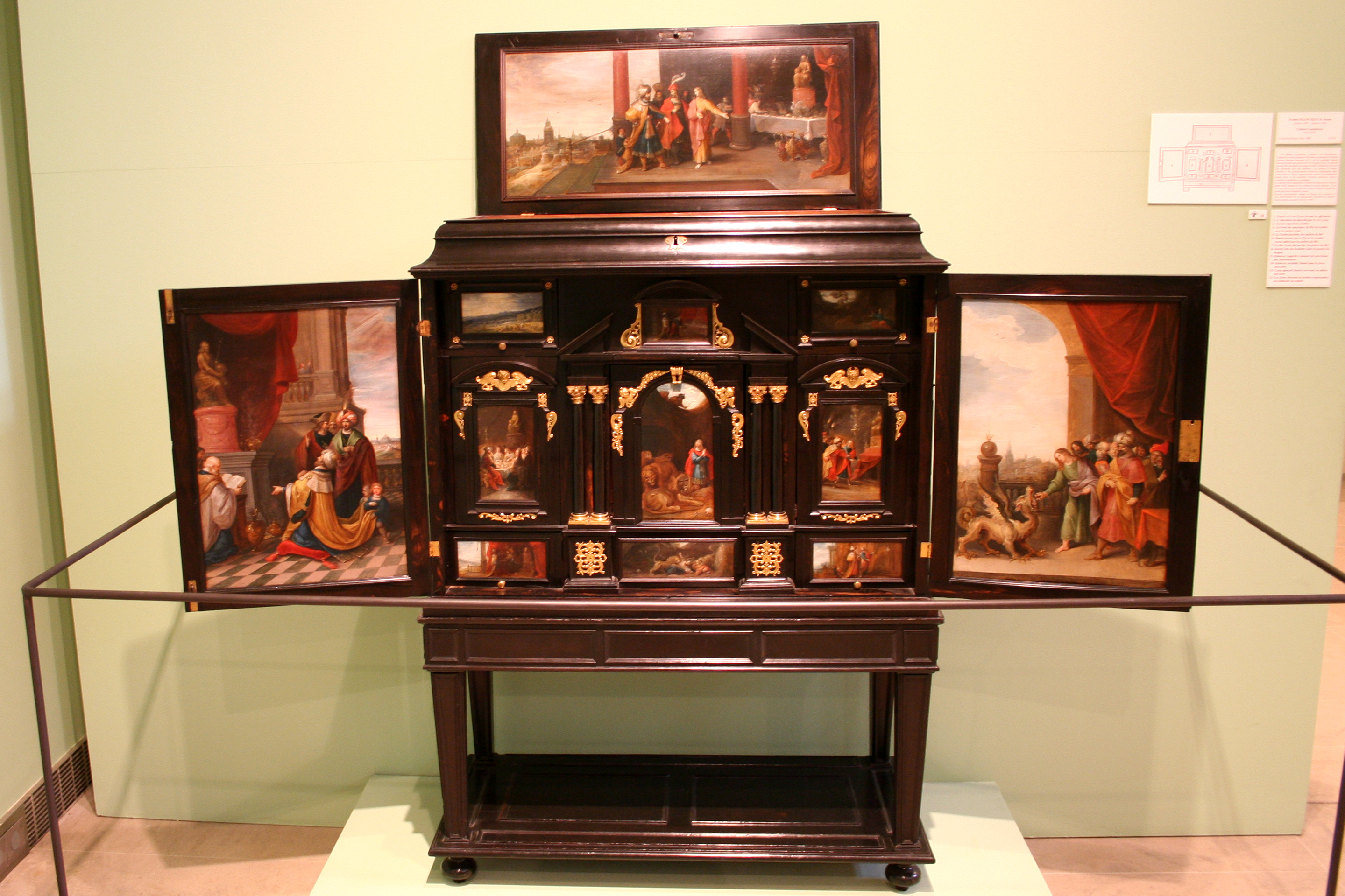 Coffre à peintures de Frans Franken le jeune (vers 1620) composé de 12 panneaux illustrant un passage de la Bible relatif à la vie du prophète Daniel.